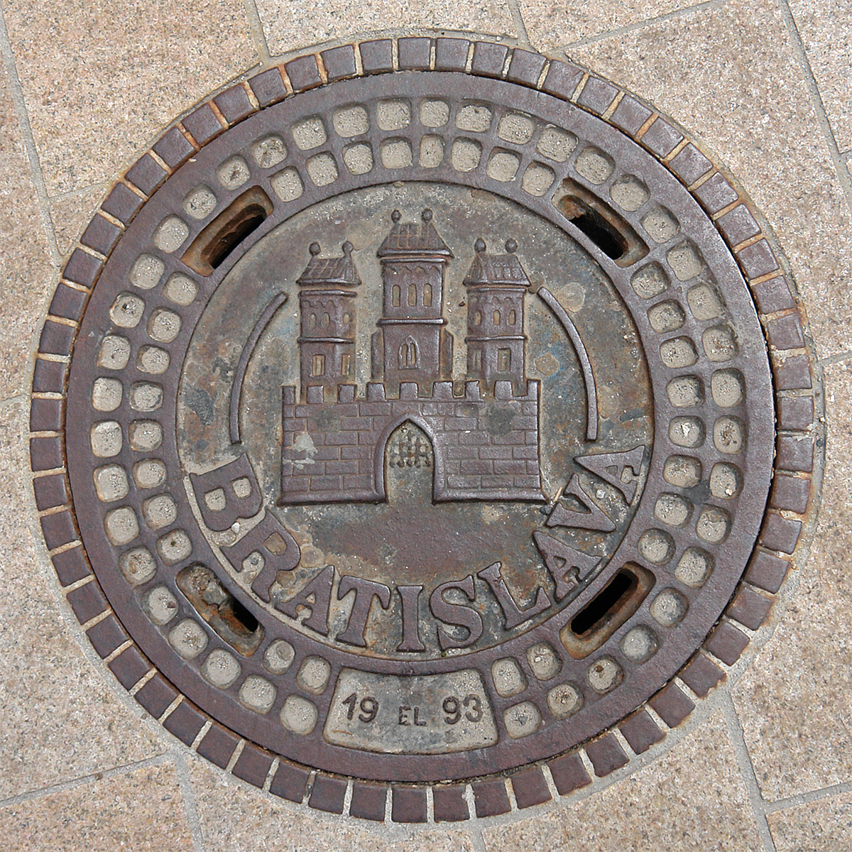 Schachtdeckel auf dem Marktplatz in Bratislava